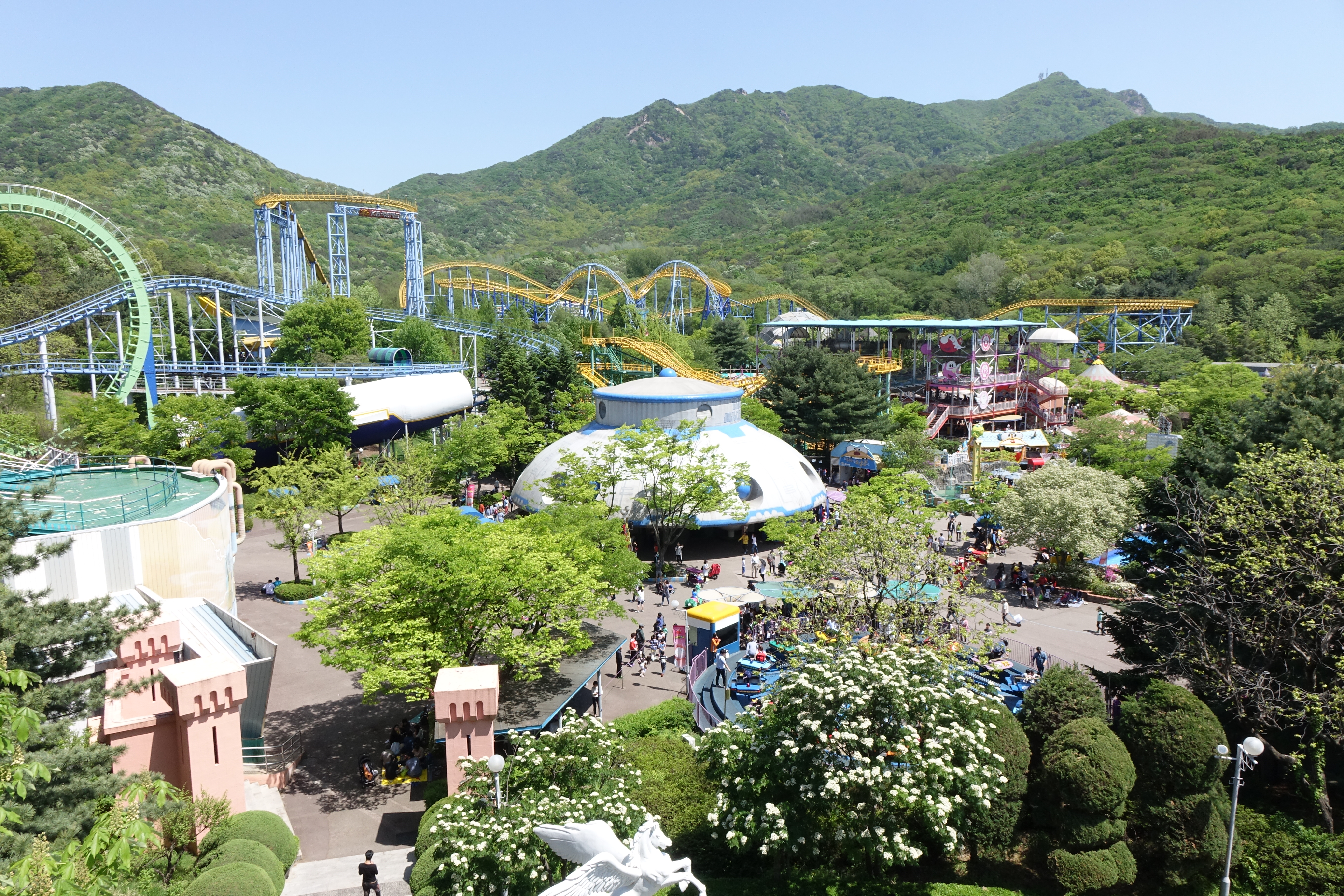 2015년 5월 경기도 과천시 서울랜드